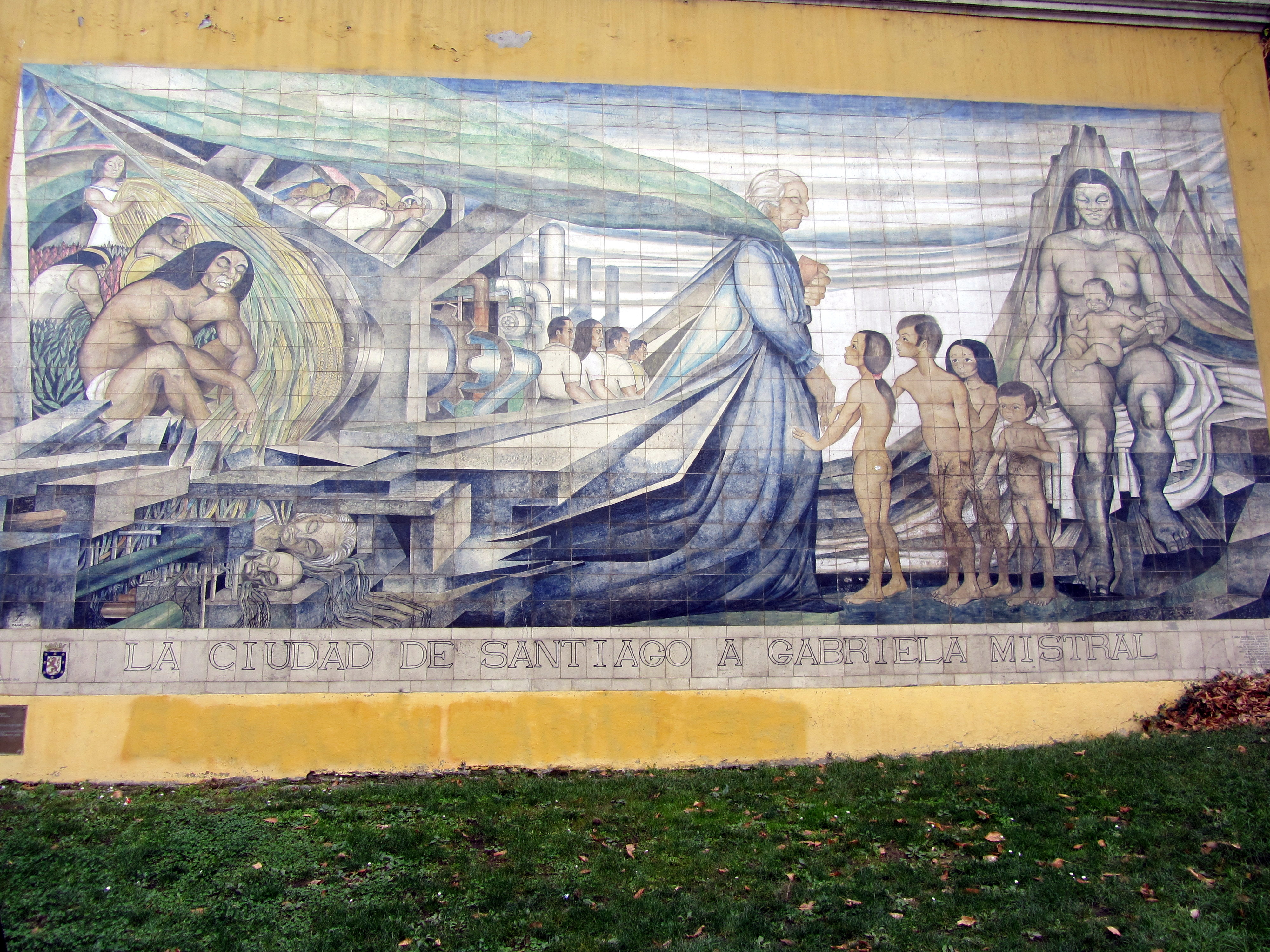 Mural en cerámica de Fernando Daza en homenaje a Gabriela Mistral, ubicado a los pies del Cerro Santa Lucía